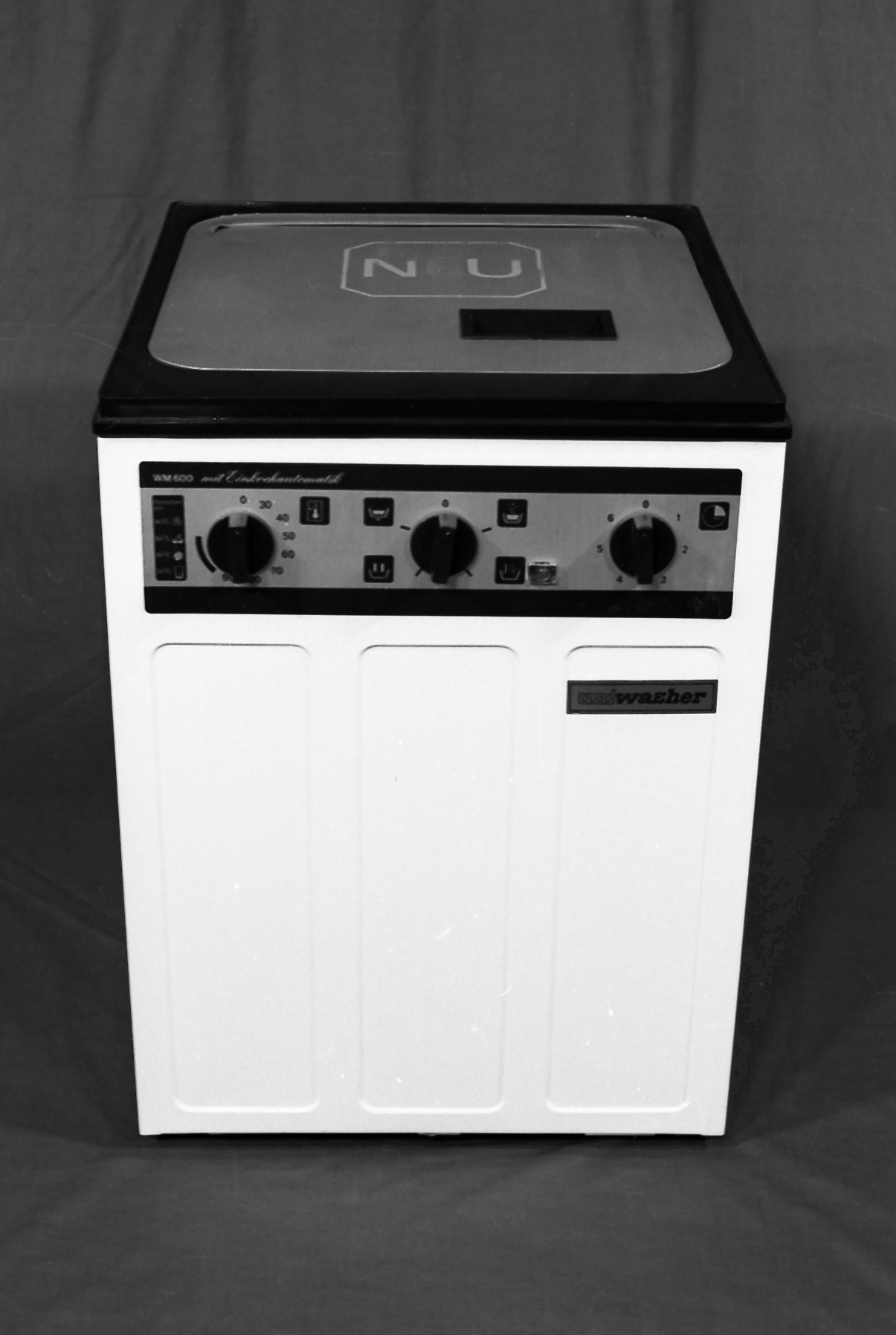 Frontansicht der Waschmaschine WM600 (Hersteller: VEB Waschgerätewerk Schwarzenberg)